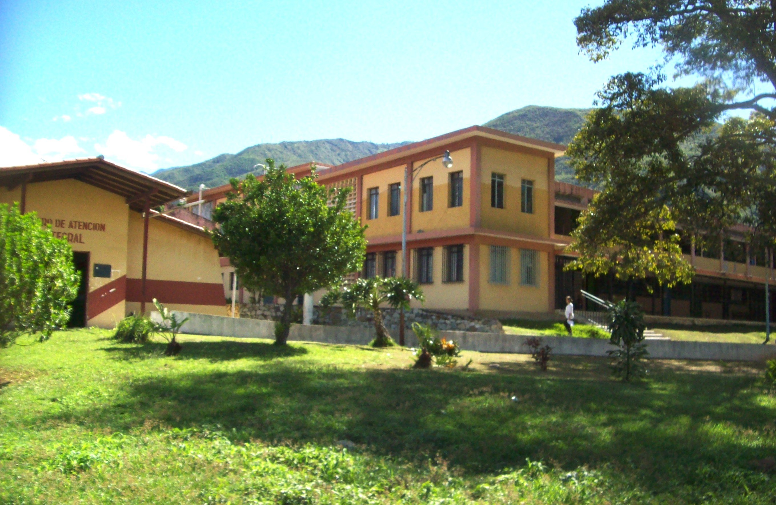 Vista de la parte posterior del Hospital San Jose de Tovar